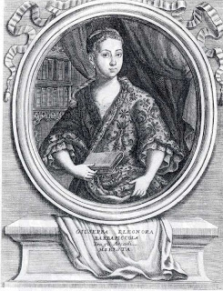 Джузеппа Элеонора Барбапиккола (итал. Giuseppa Eleonora Barbapiccola, 1702 — прим. 1740) — итальянка-натурфилософ, поэт и переводчик.